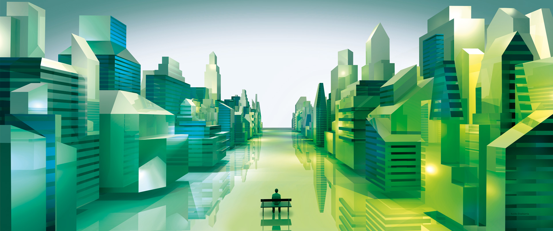 Cuadro del pintor vasco Koldo Etxabarria con el título "La estética del ser".